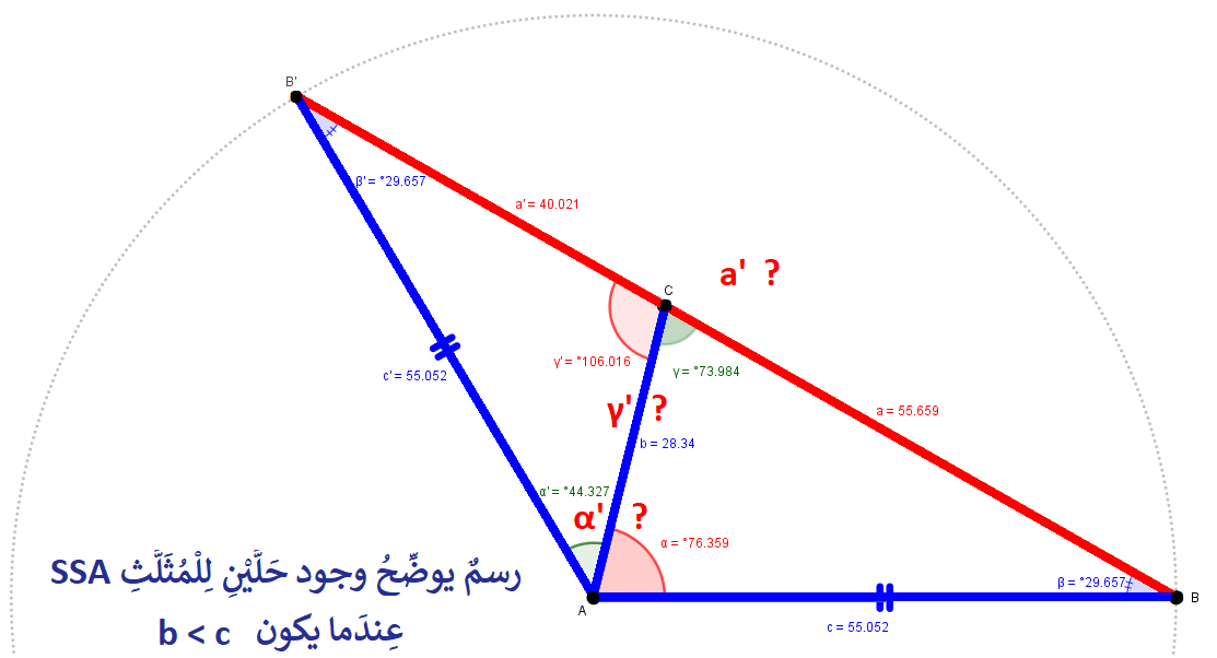 حلان للمثلث SSA معلوم الجانبين وزاوية غير محصورة بينهما لو المقابل للزاوية المجهولة b أصغر مِن نظيره المعلوم c .